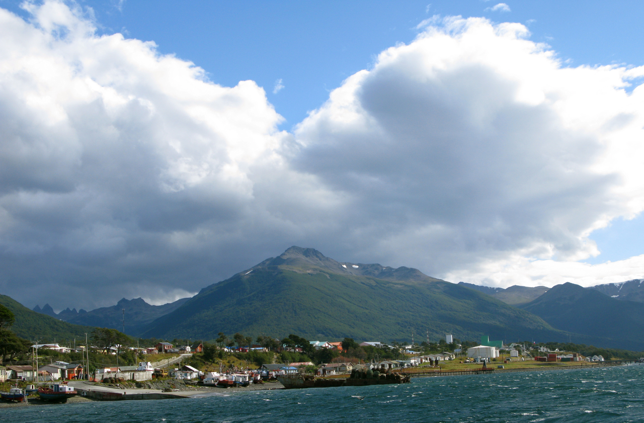 Puerto Williams (vue du Beagle) - 2009